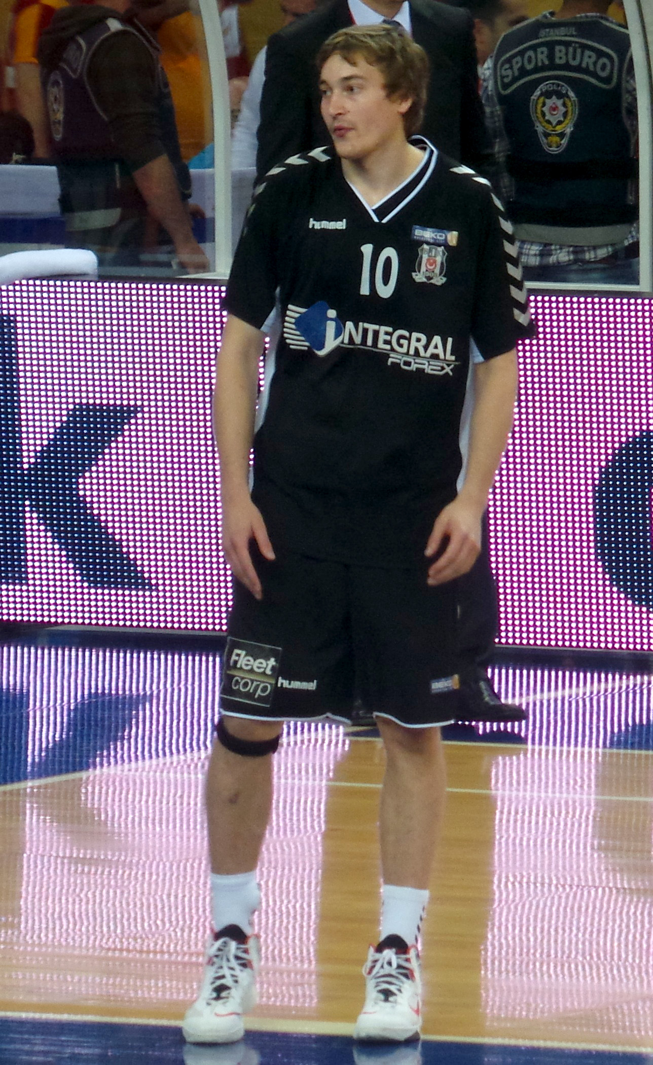 Ryan Broekhoff